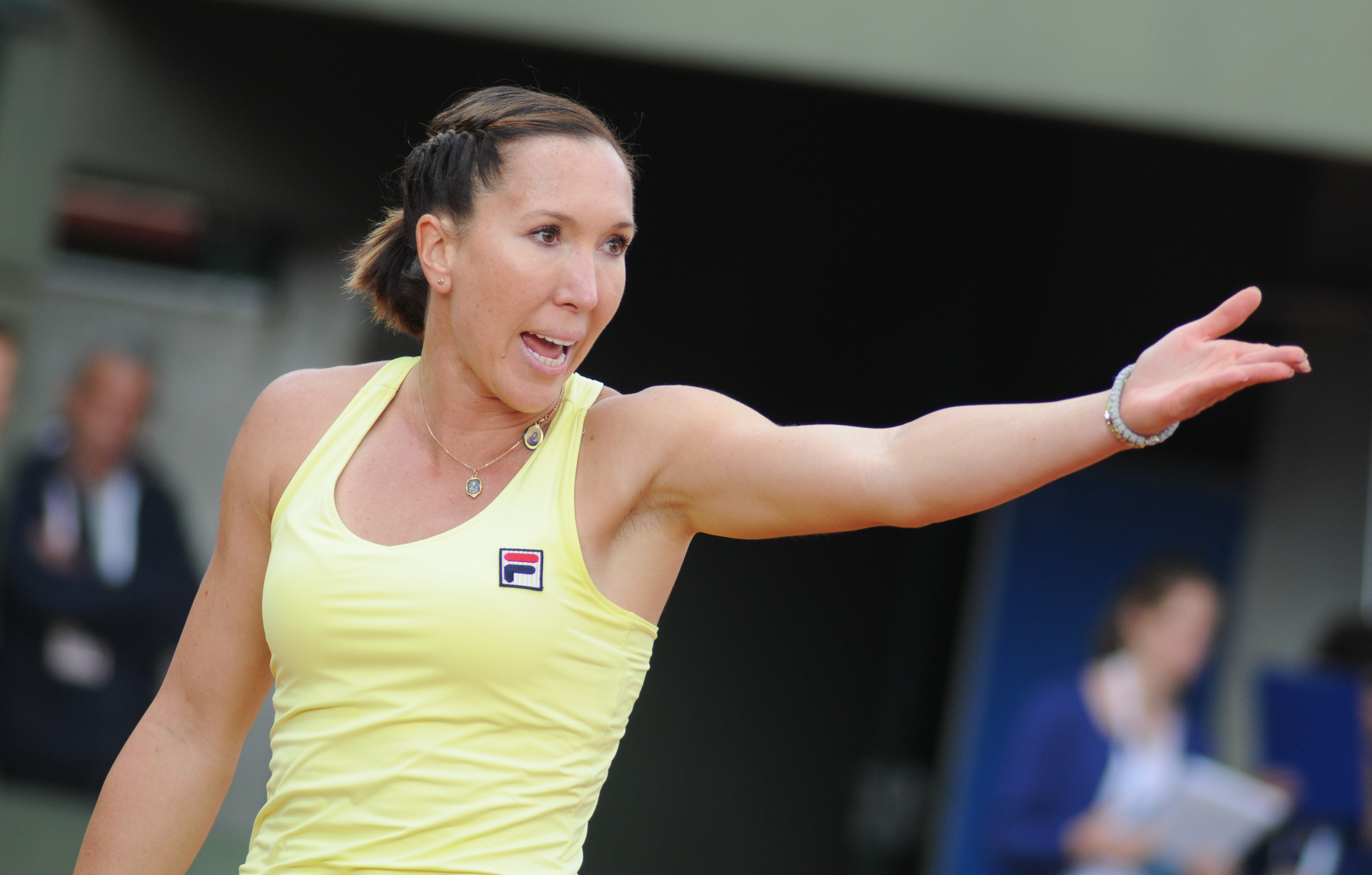 Jelena Jankovic